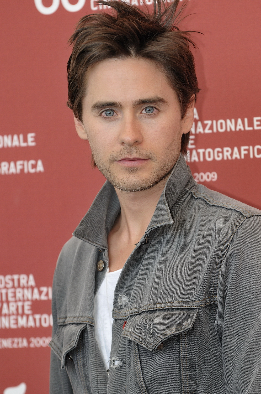 66ème Festival du Cinéma de Venise (Mostra), 10ème jour (11/09/2009) Photocall avec Jared Leto, Diane Kruger, Sarah Polley et le réalisateur Jaco Van Dormel pour le film : MR. NOBODY